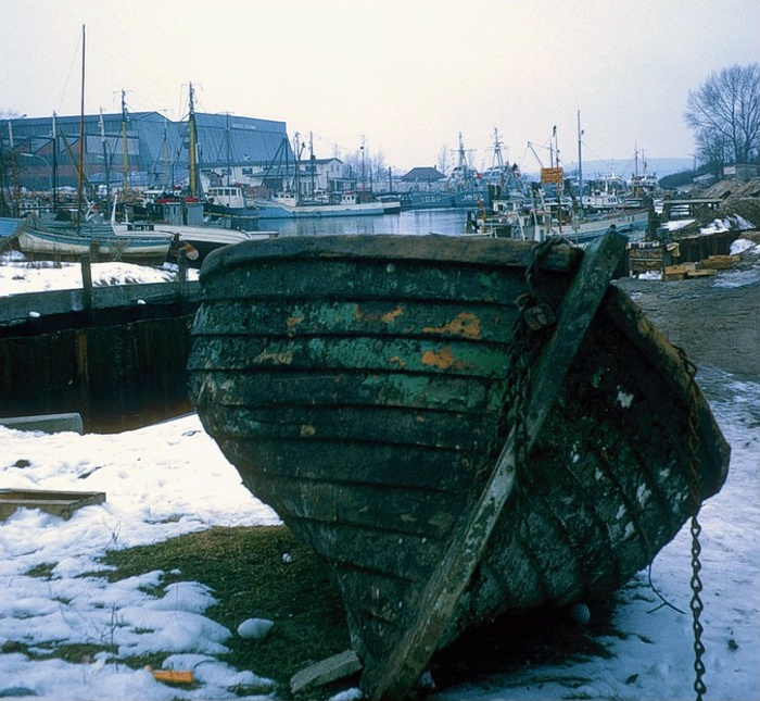 Altes Boot im Niendorfer Hafen